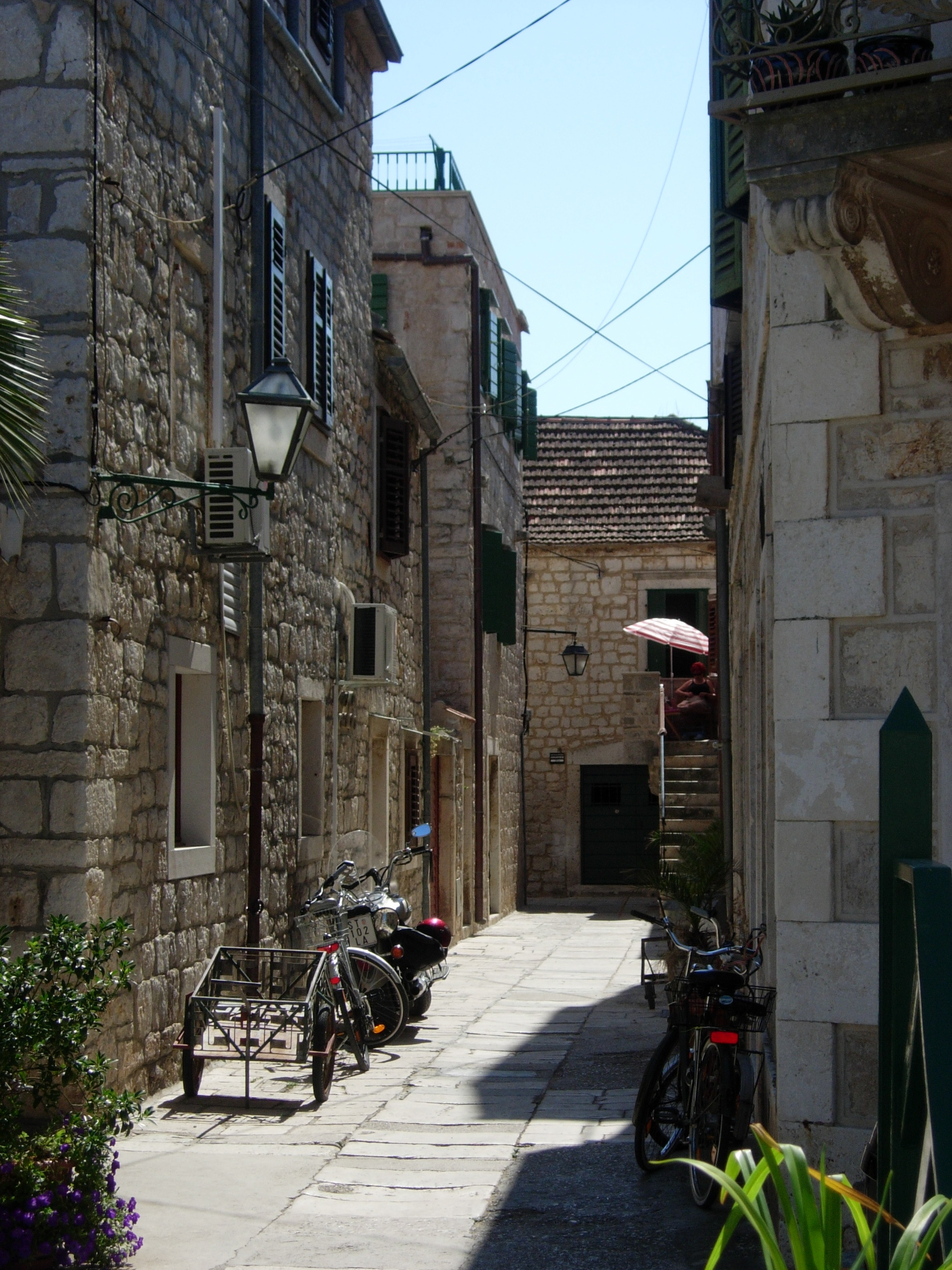 Street by Trg Tvrdalj between restaurants Barba Luka and Odisej in Stari Grad.